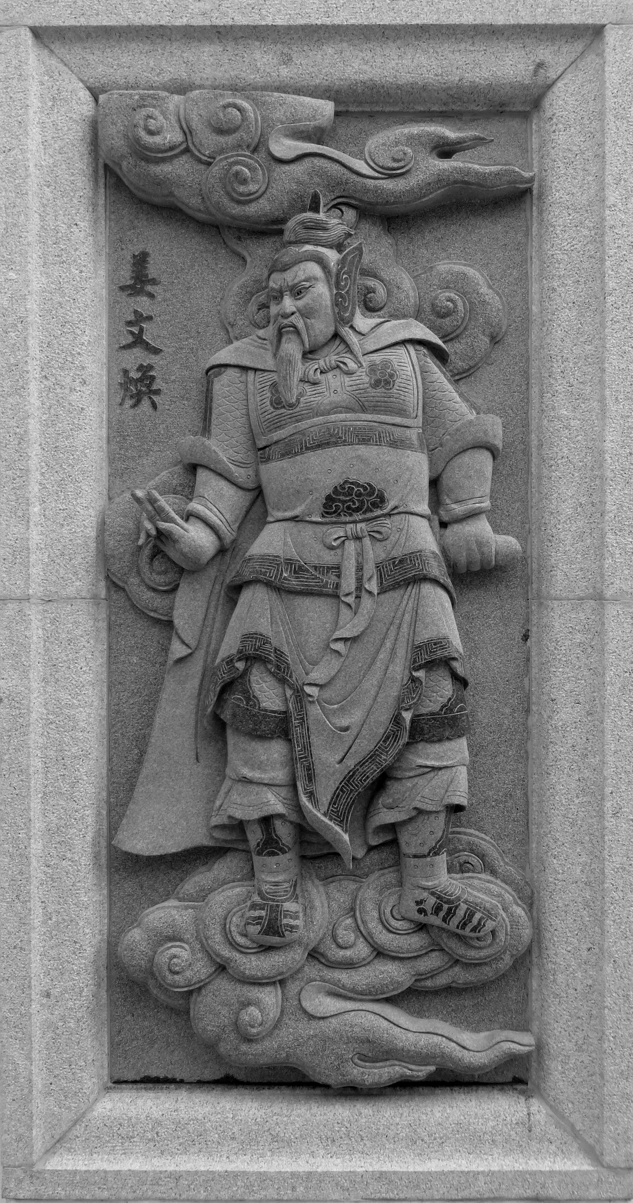 108 Jiang Wenhuan, Investiture of the Gods at Ping Sien Si, Pasir Panjang, Perak, Malaysia Photograph from the Ping Sien Si Temple in Perak, Malaysia taken by Anandajoti.